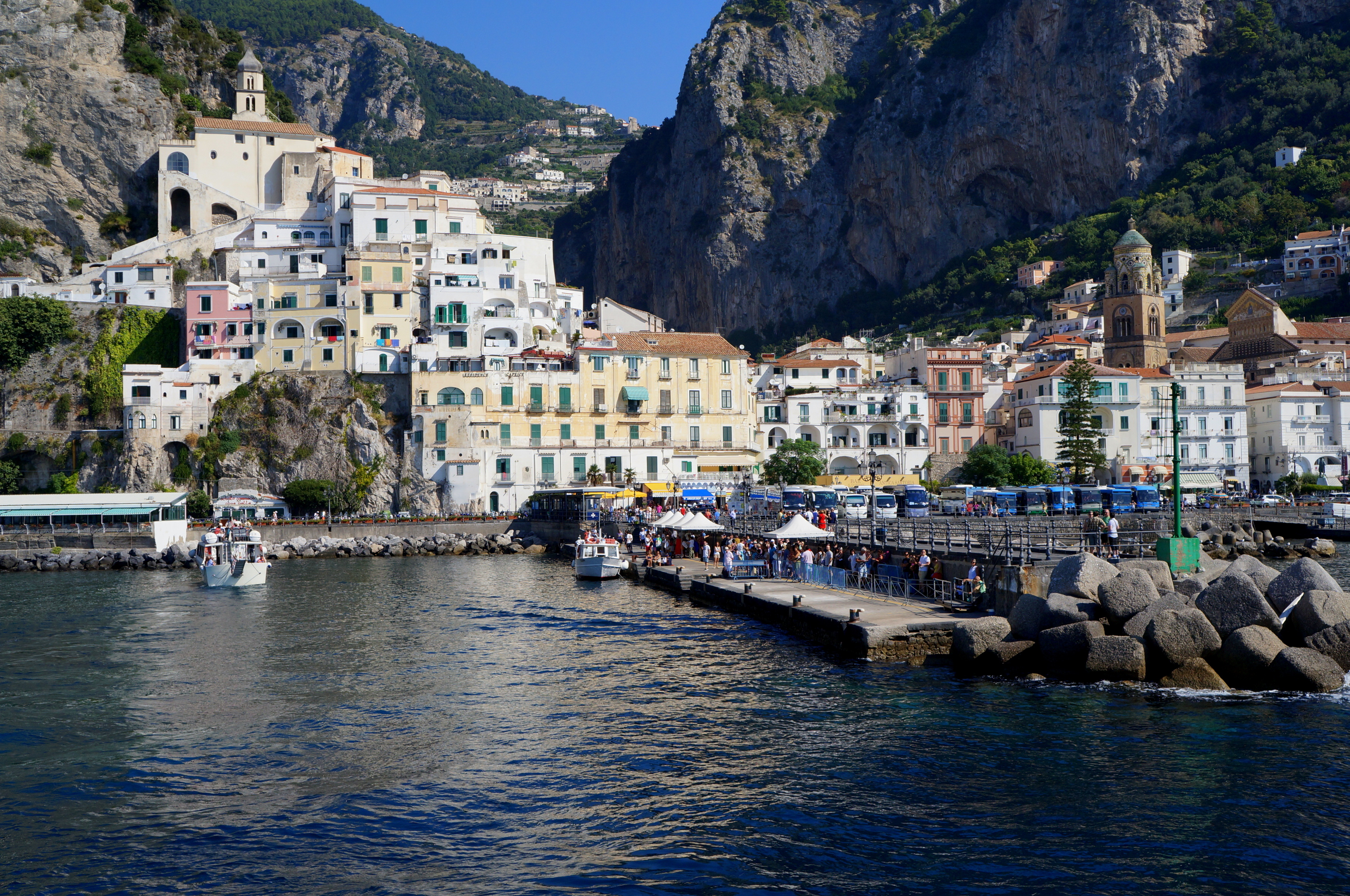 Amalfi, Salerno. Italia.